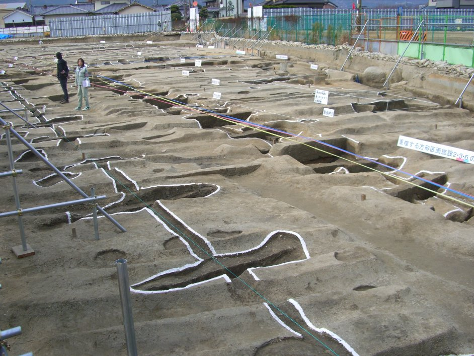 秋津嶋宮伝承地から出土した、高床式建物を取り囲む塀の柱穴